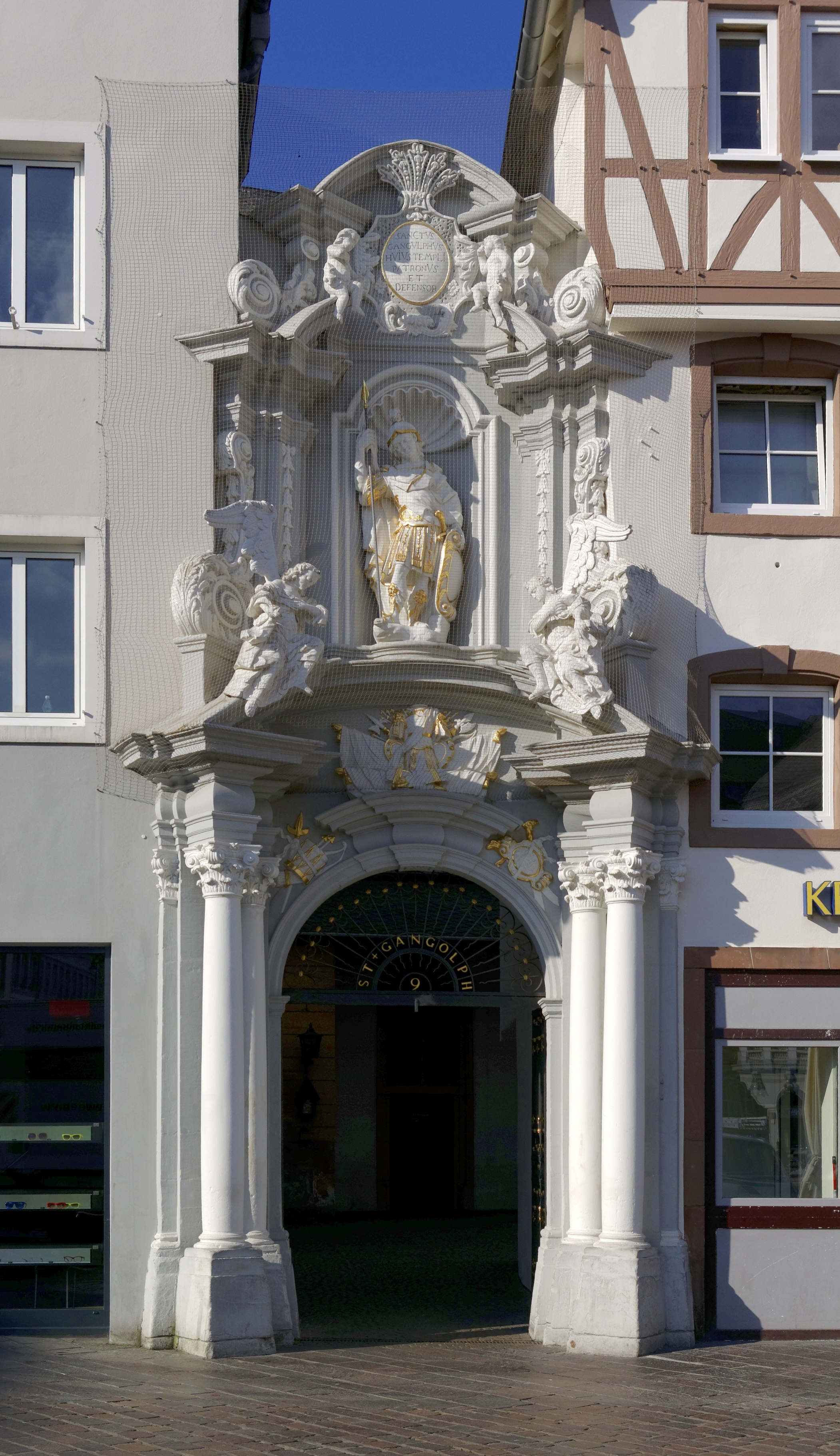 Trier, Hauptmarkt 9, Eingang zur Kirche St. Gangolph